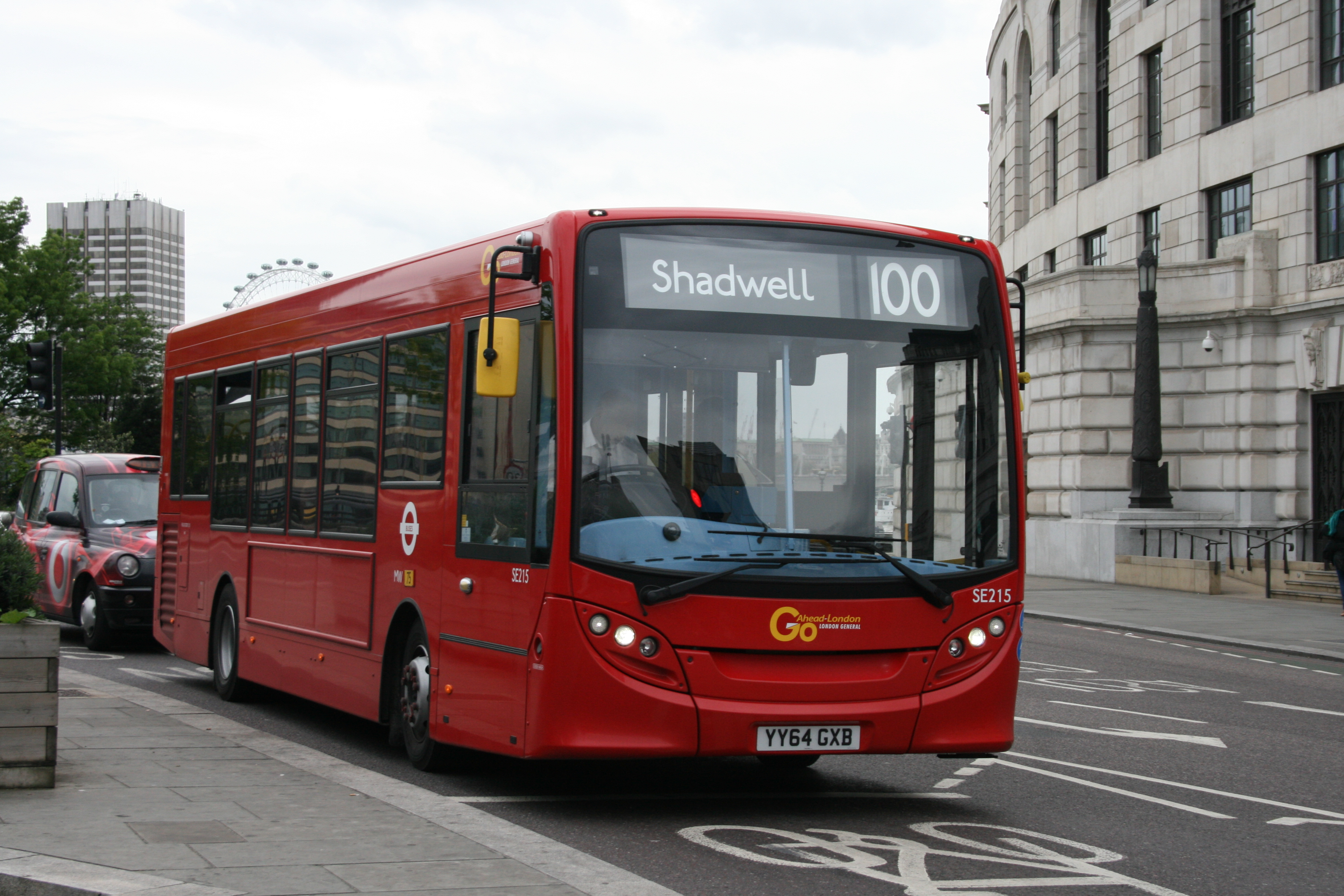 YY64 GXB